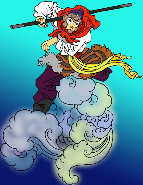 Illustration for Tôn Ngộ Không by Hai Dang Quang